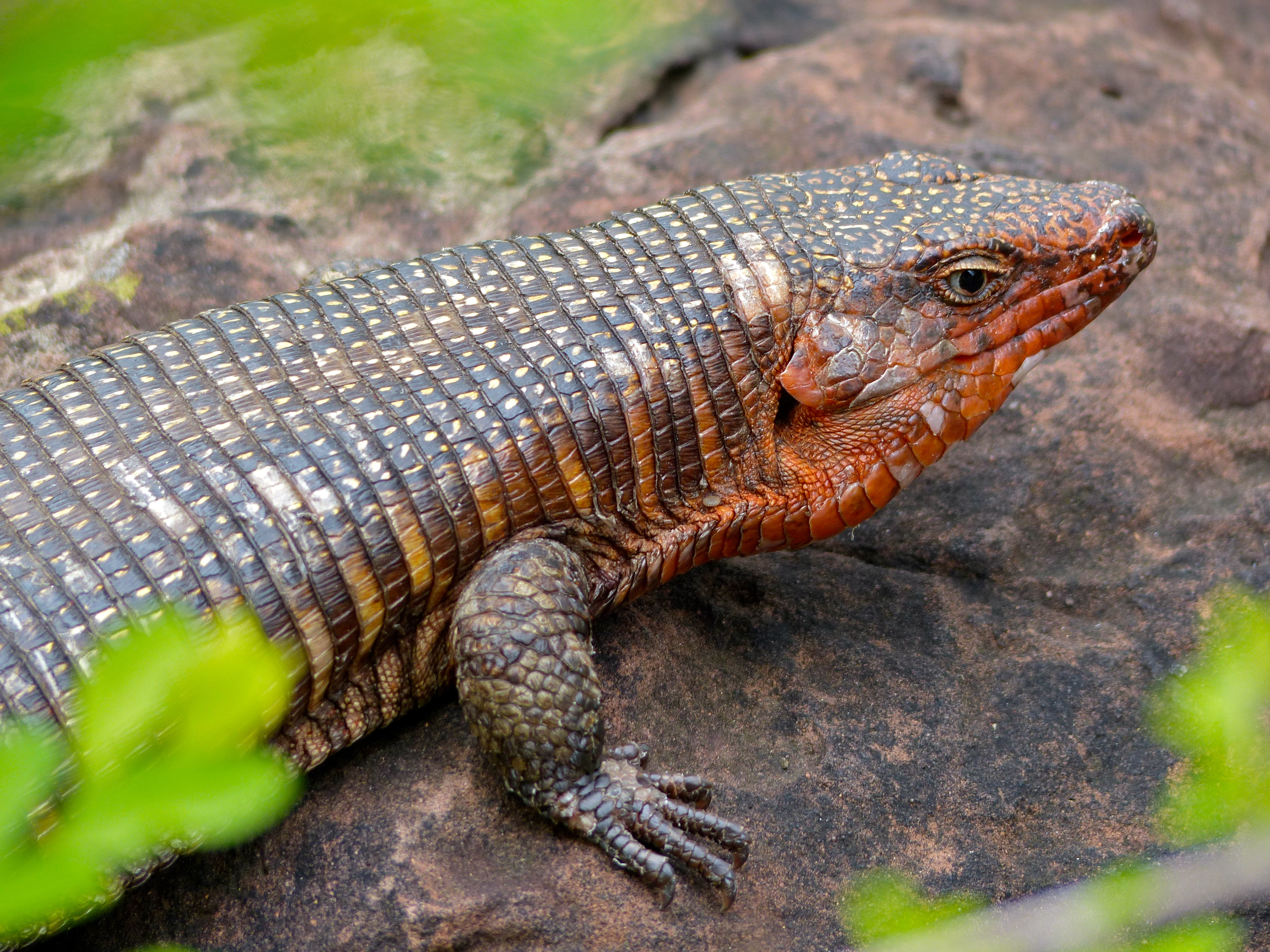 Bungalow N°51, Mopani Camp, Kruger NP, SOUTH AFRICA